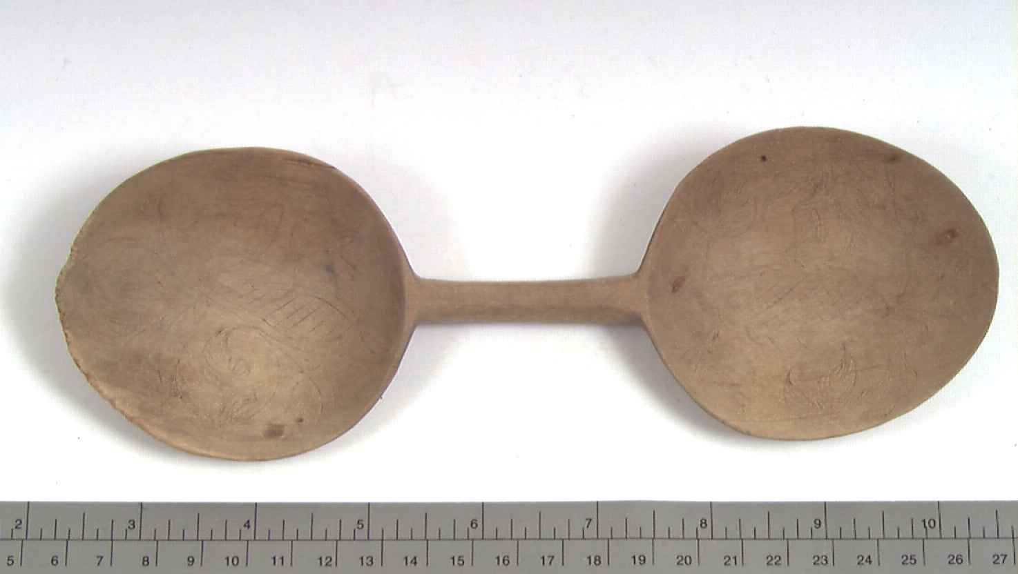 Dobbeltskje ant, fra 1800-tallet, fra Ål i Hallingdal. Foto Norsk Folkemuseum / Anne-Lise Reinsfelt, NF.1911-0443.